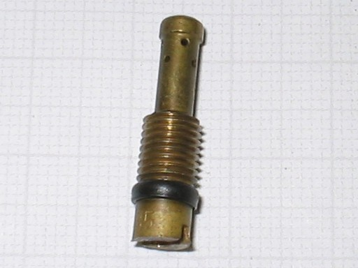 Getto per carburatori motociclistici a ghigliottina